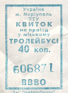 Mariupol_trol_ticket билет в троллейбусе Мариуполя - 2007